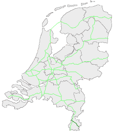 Locatie E314 in Nederland, zelf gemaakt